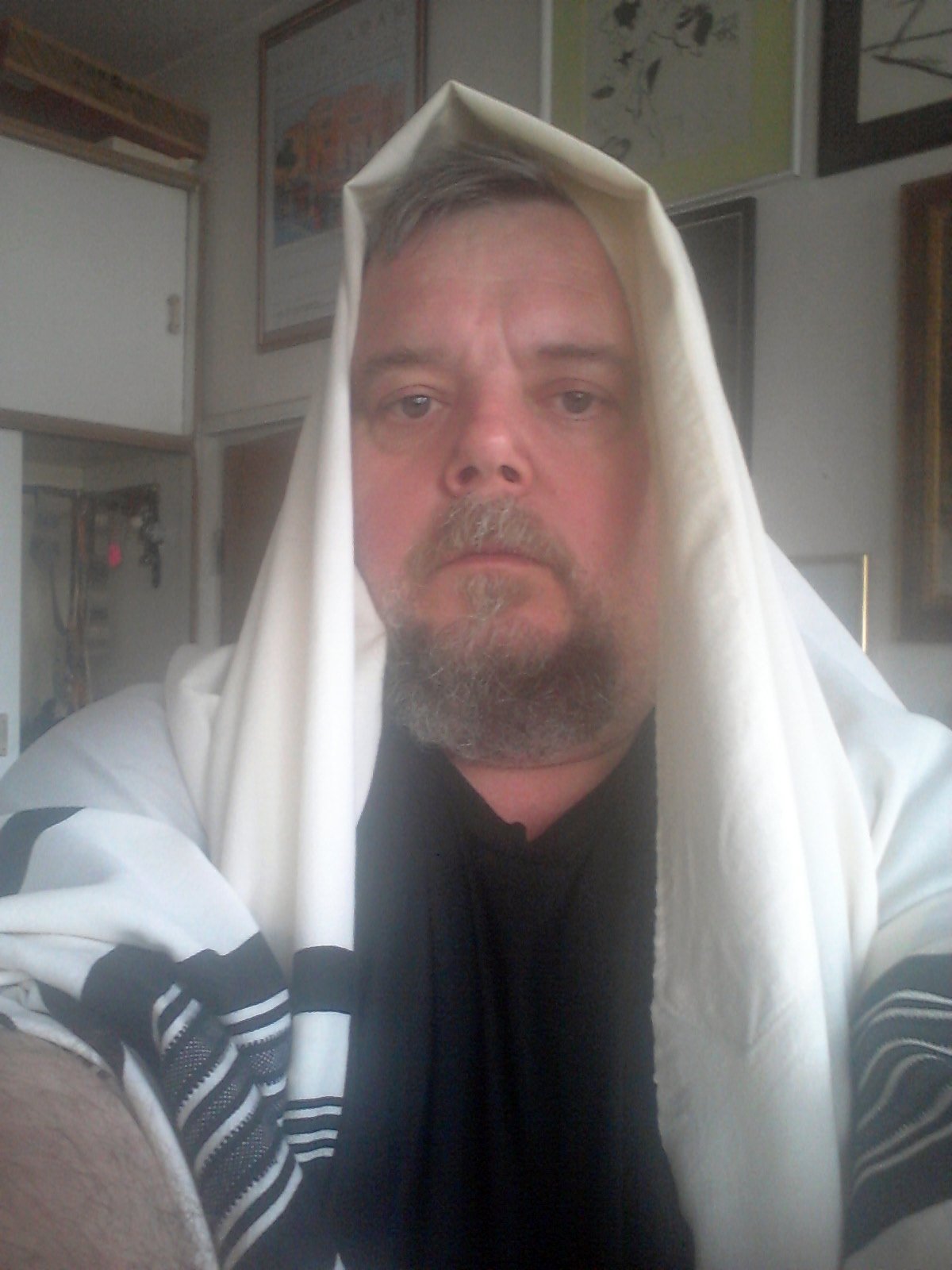 Sorin Adam (n. 22 august 1968, Ploiești) este un pictor și grafician român. El a fost student al profesorului Vasile Grigore la Academia de Arte „Luceafărul” din București